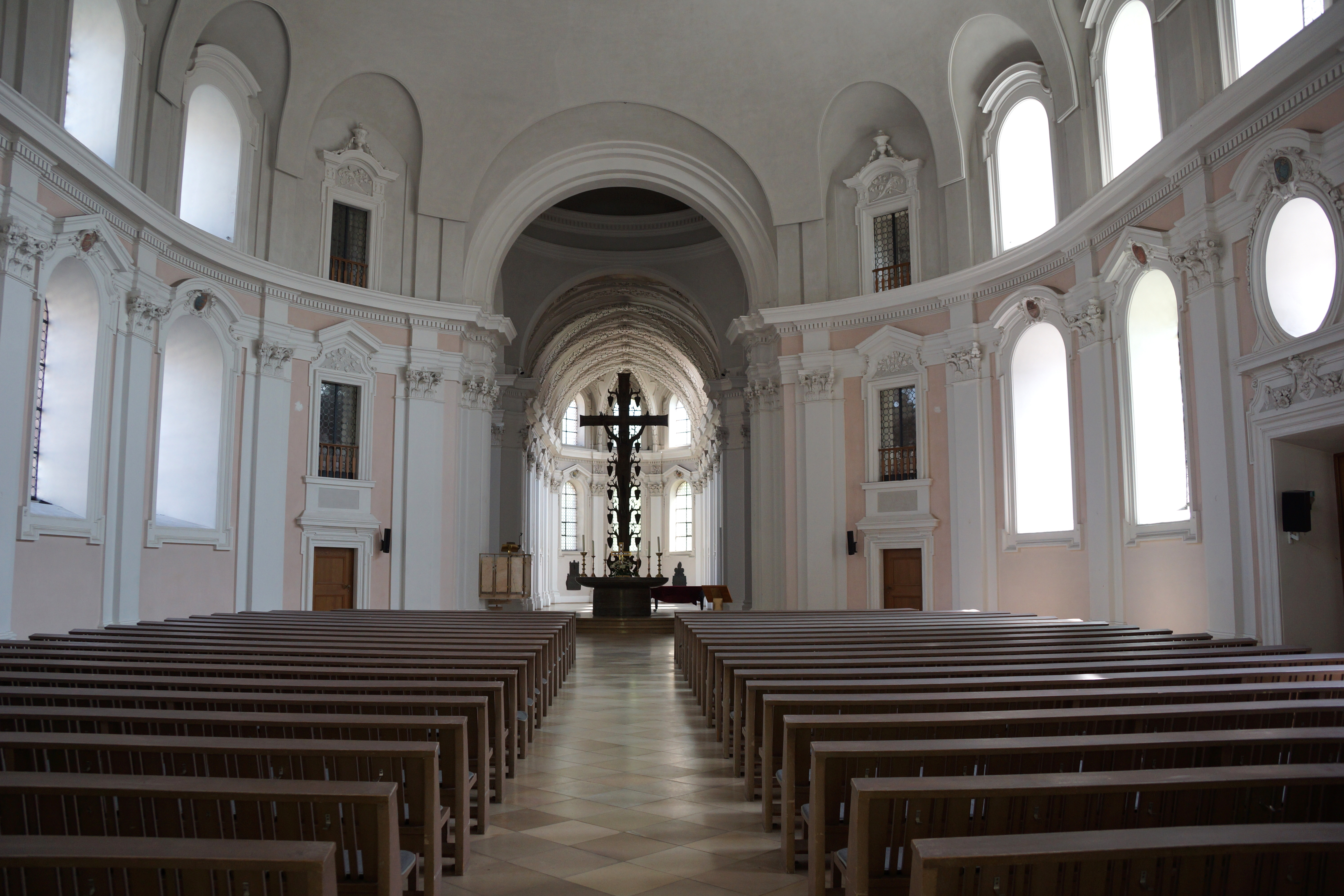 St. Egidien / Egidienkirche in Nürnberg